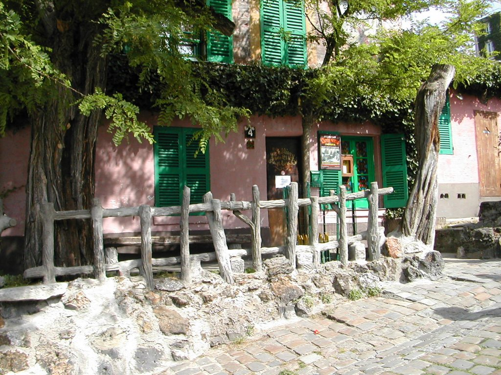 Vue du Lapin agile de Montmartre (Paris, France).